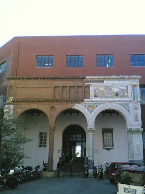 Musei Industriale